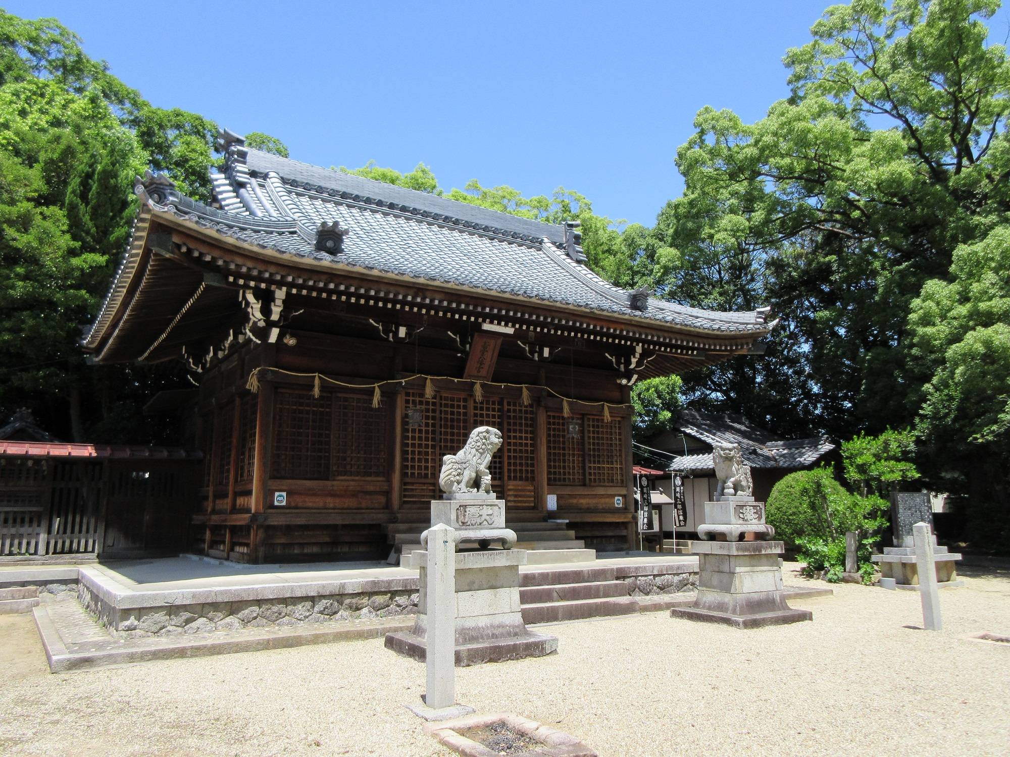 若宮八幡宮（岡崎市朝日町）